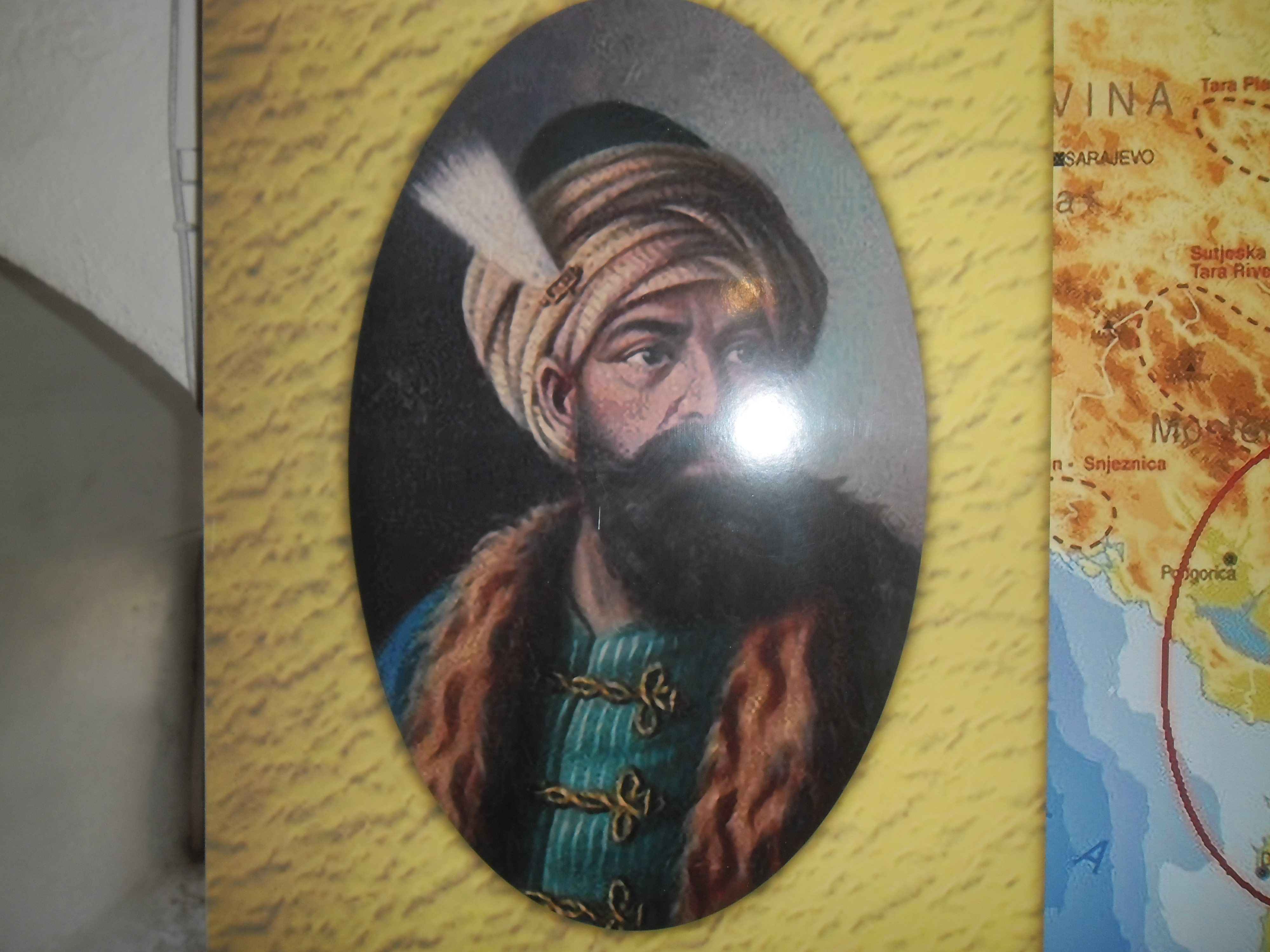 Shkodër